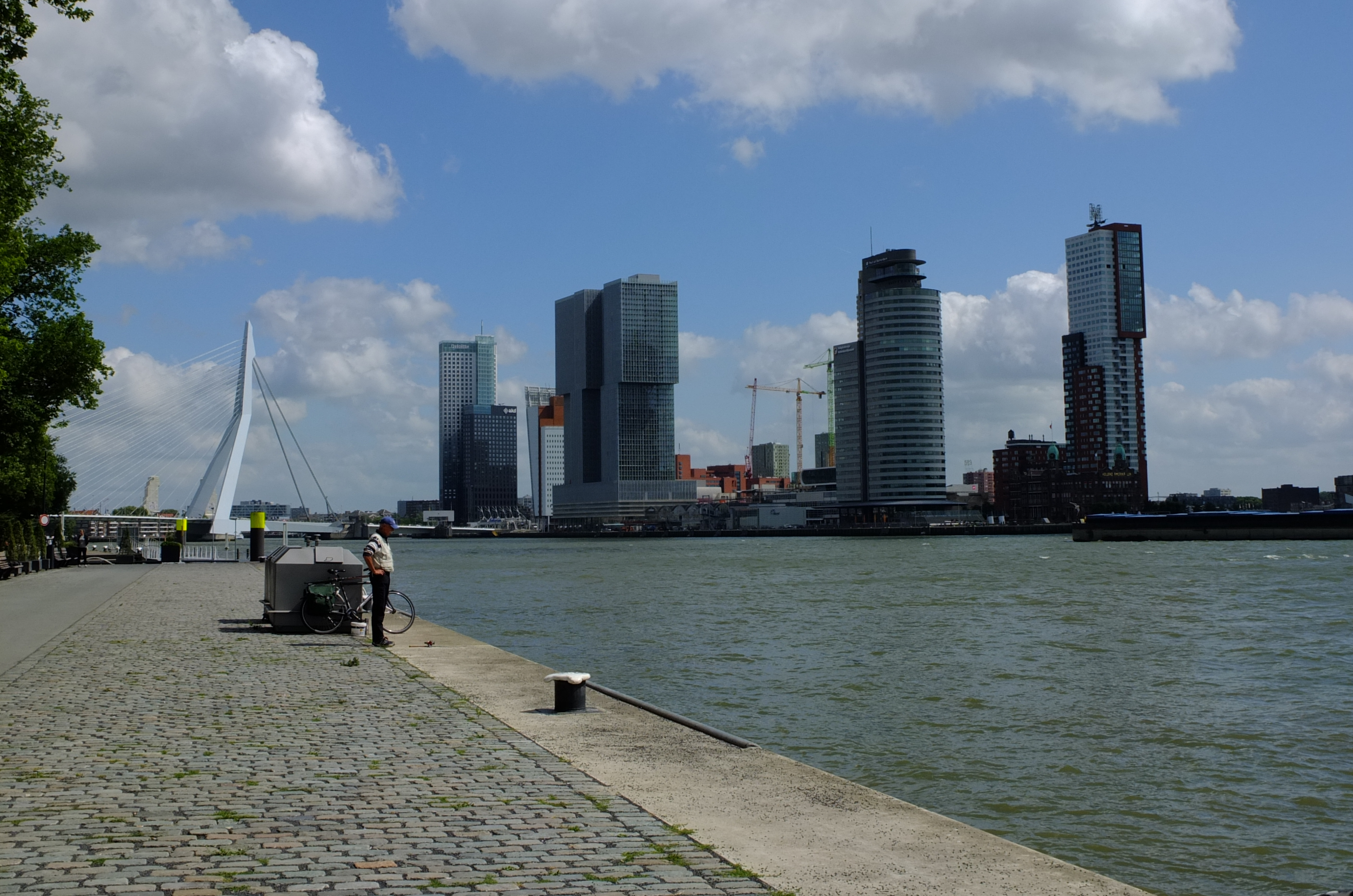 Kop van Zuid